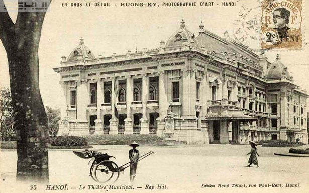 Nhà hát Lớn Hà Nội đầu thế kỷ 20